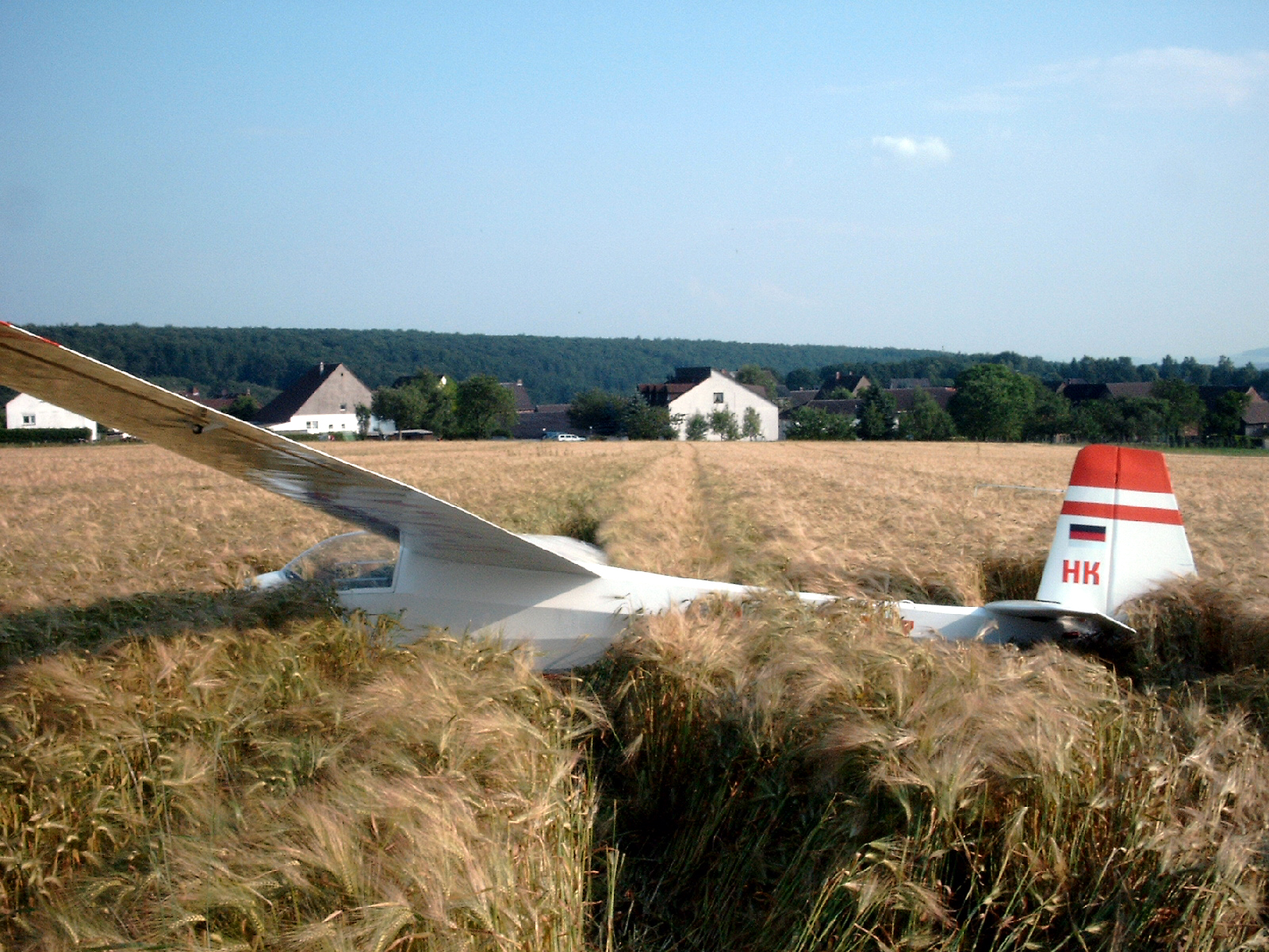 Ka8 im Kornfeld, Maschine und Pilot ohne Schaden, der Bauer war auch nicht so böse.